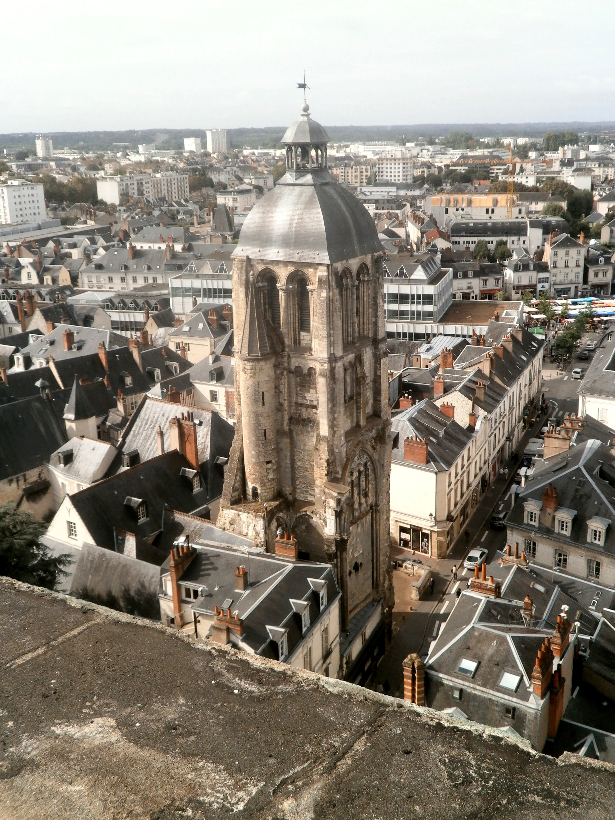 Vue générale de la tour de l'Horloge depuis la Tours Charlemagne.